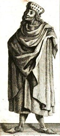 Vratislav I.